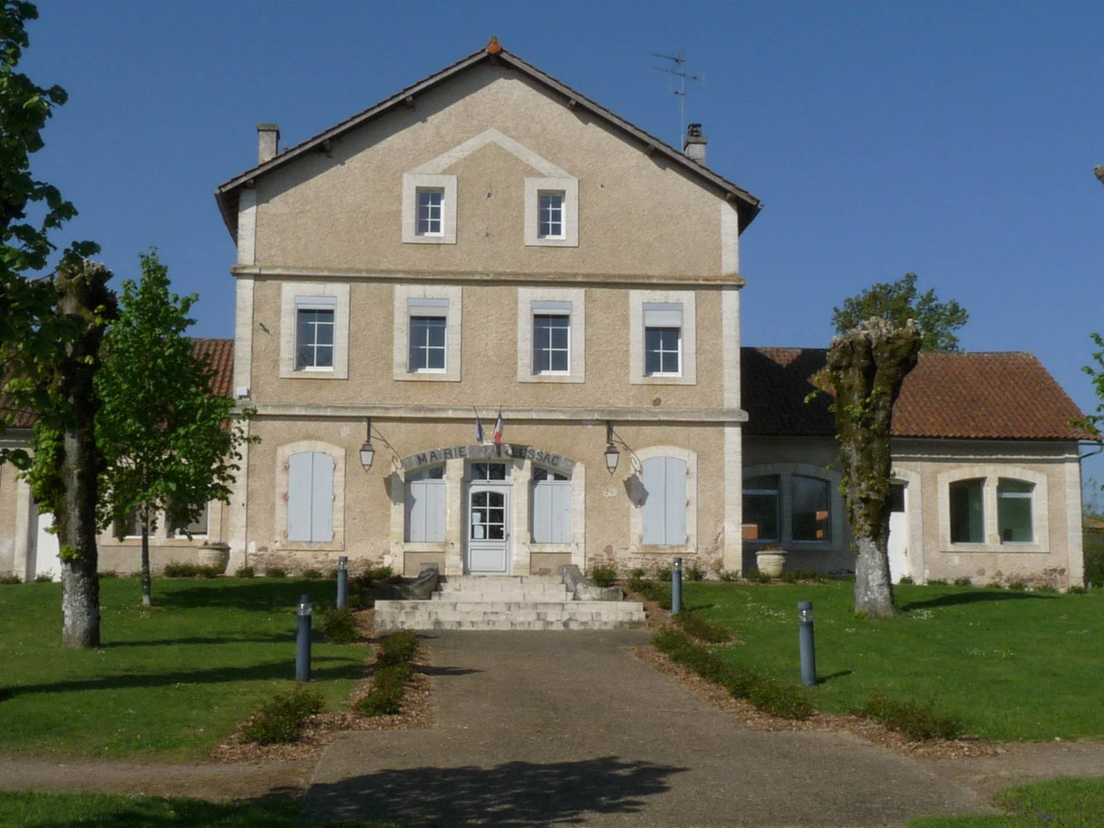 Mairie-école de Lessac, Charente, France